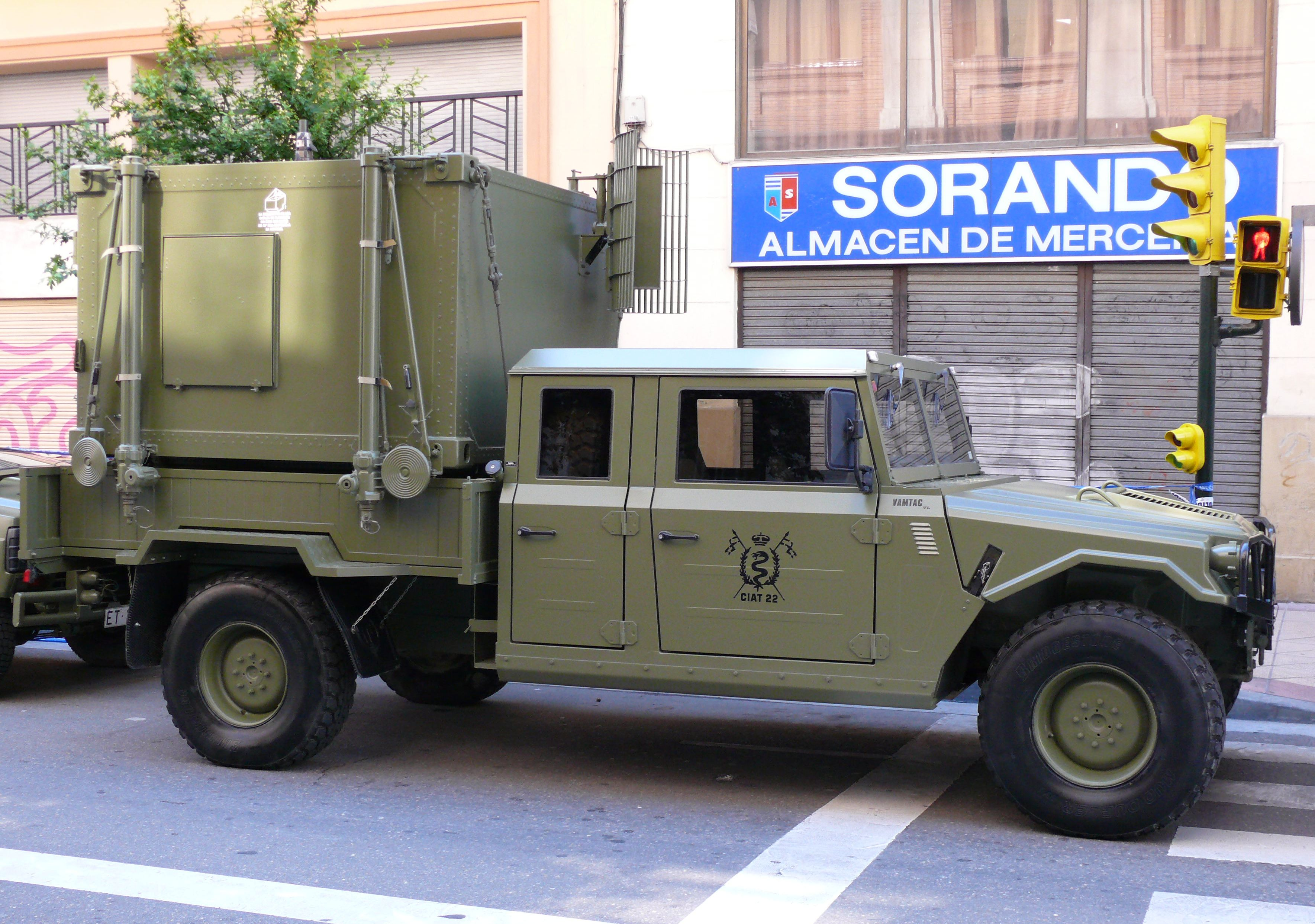 URO VAMTAC en su aplicación como porta-shelter del Ejército de Tierra de España en el desfile del día de las Fuerzas Armadas de España del 2008 en Zaragoza.